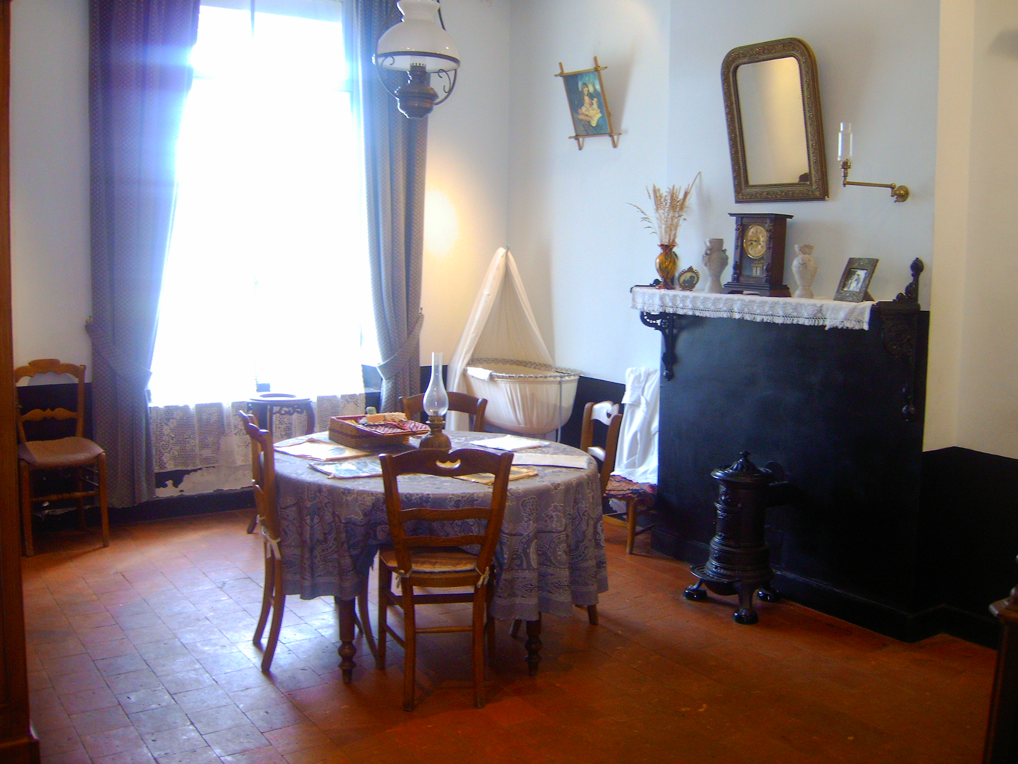 Photographie d'un appartement du familistère de Guise. L'intérieur est reconstitué tel qu'au début du XXe siècle.